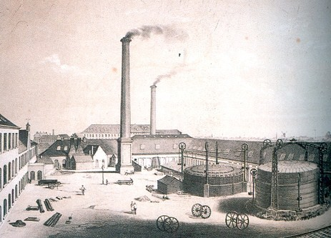 Gravure uit 1885 van de fabriek NV Le Phoenix staalen machine producten te Gent Brugse Poort